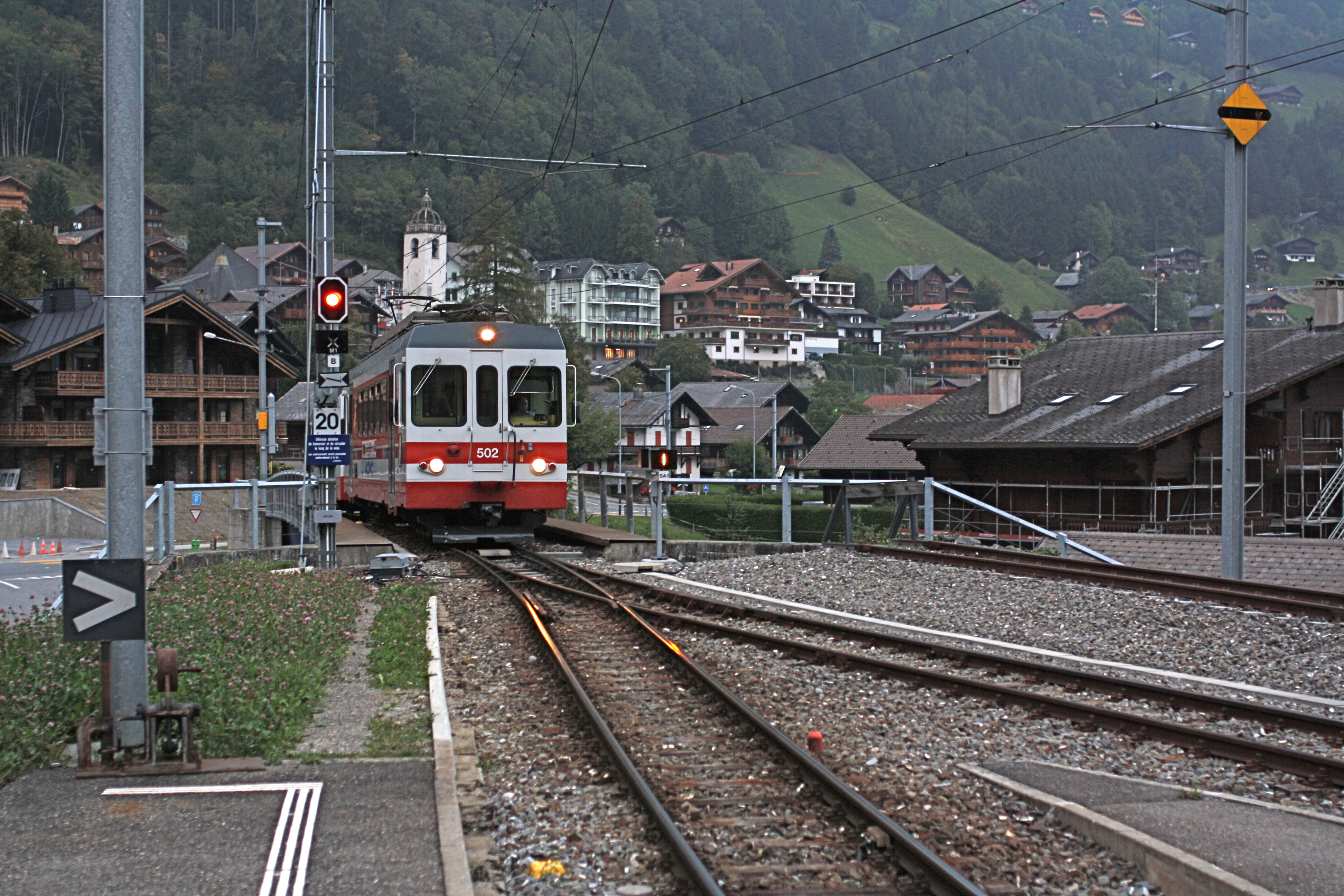 Einfahrt in den Bahnhof Champéry